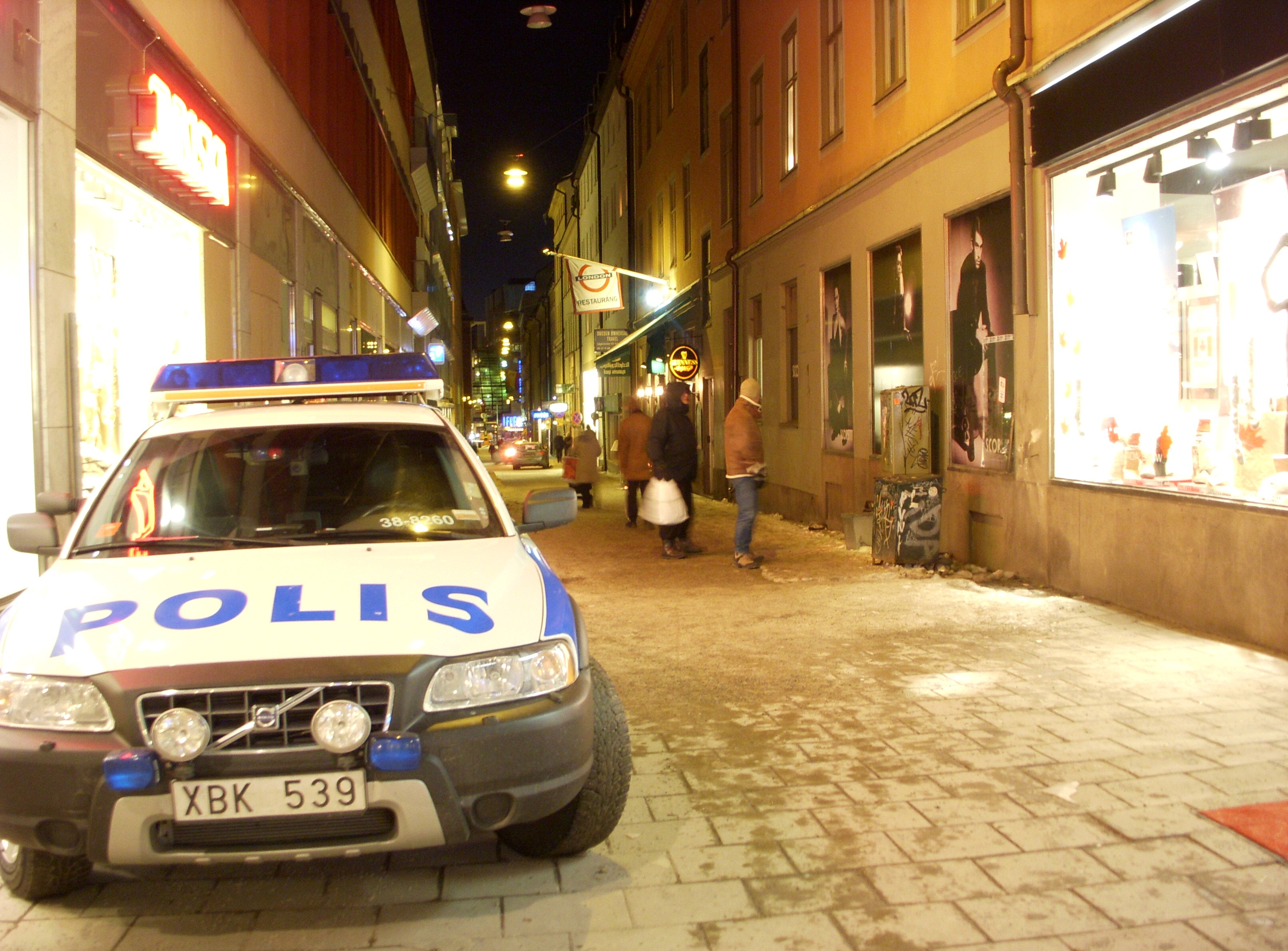 Tatort des Bombenanschlags in Stockholm 2010